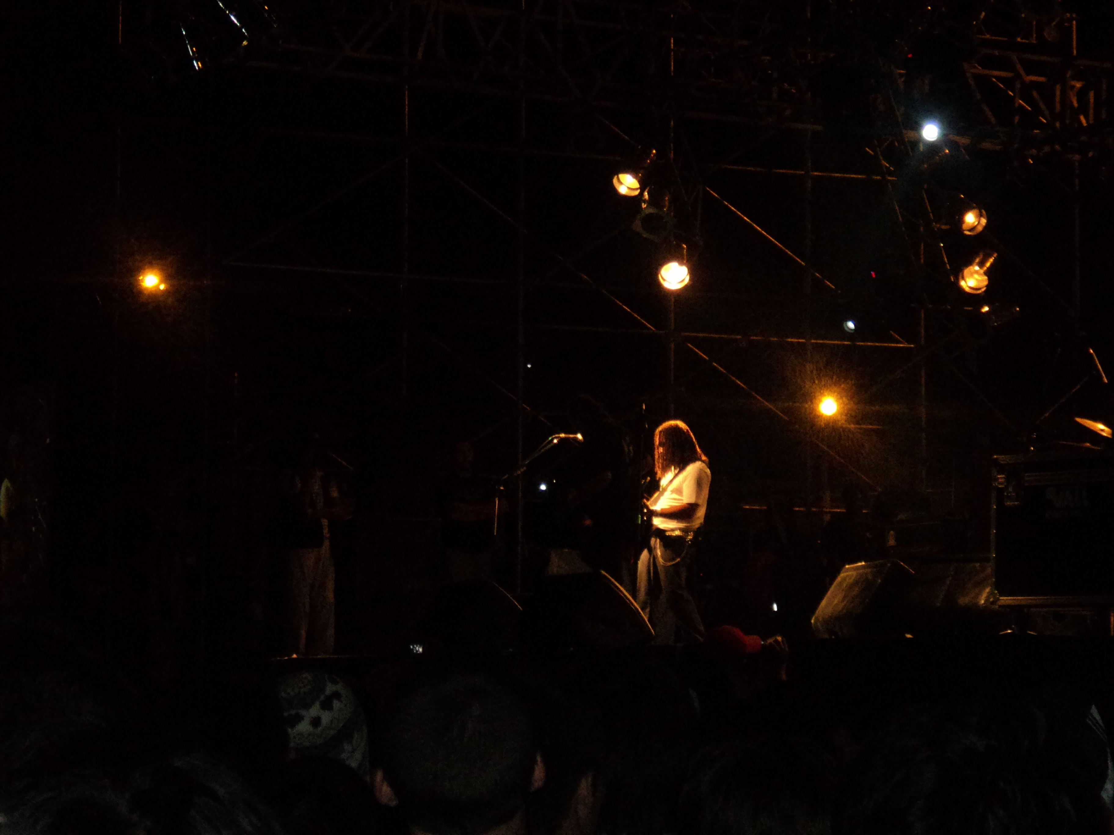 el guitarrista princpal durante el concierto